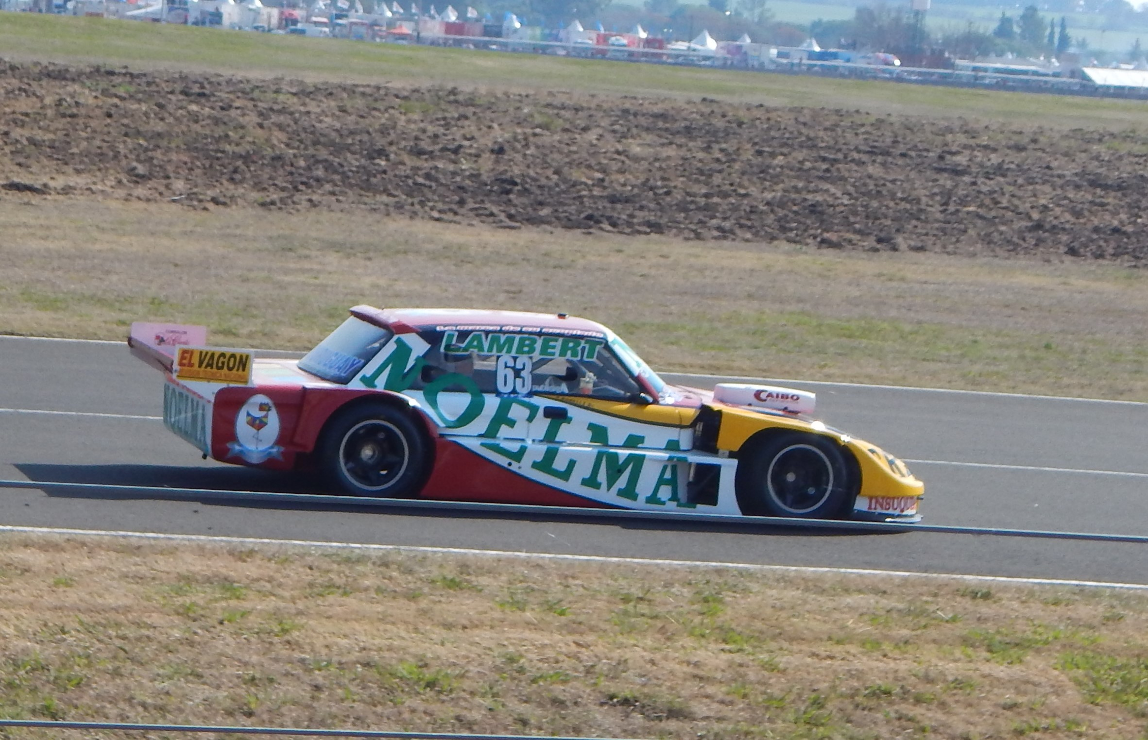 Próspero Bonelli Paraná 2015